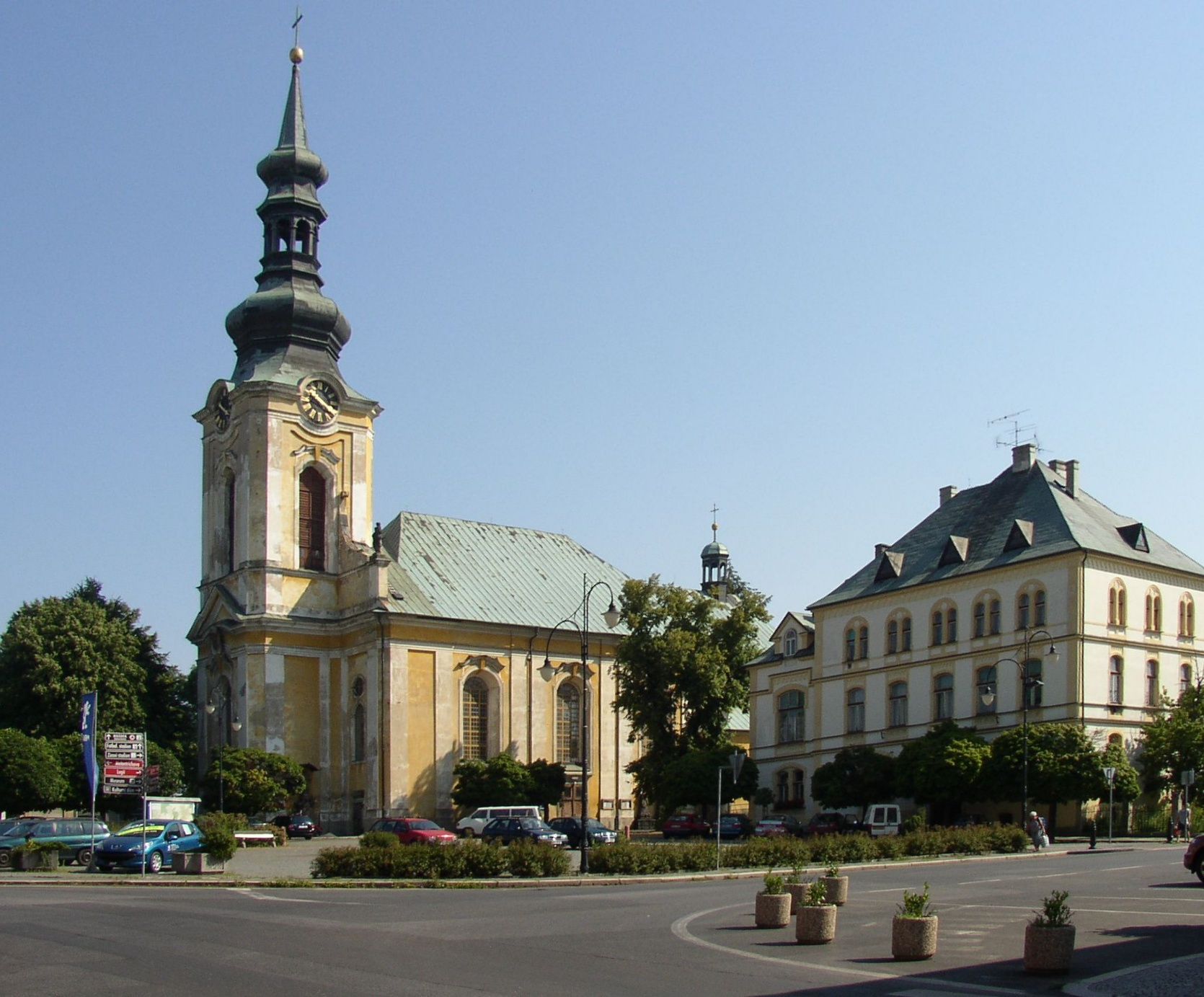 Varnsdorf, okres Děčín. Náměstí E. Beneše s kostelem sv. Petra a Pavla a děkanským úřadem